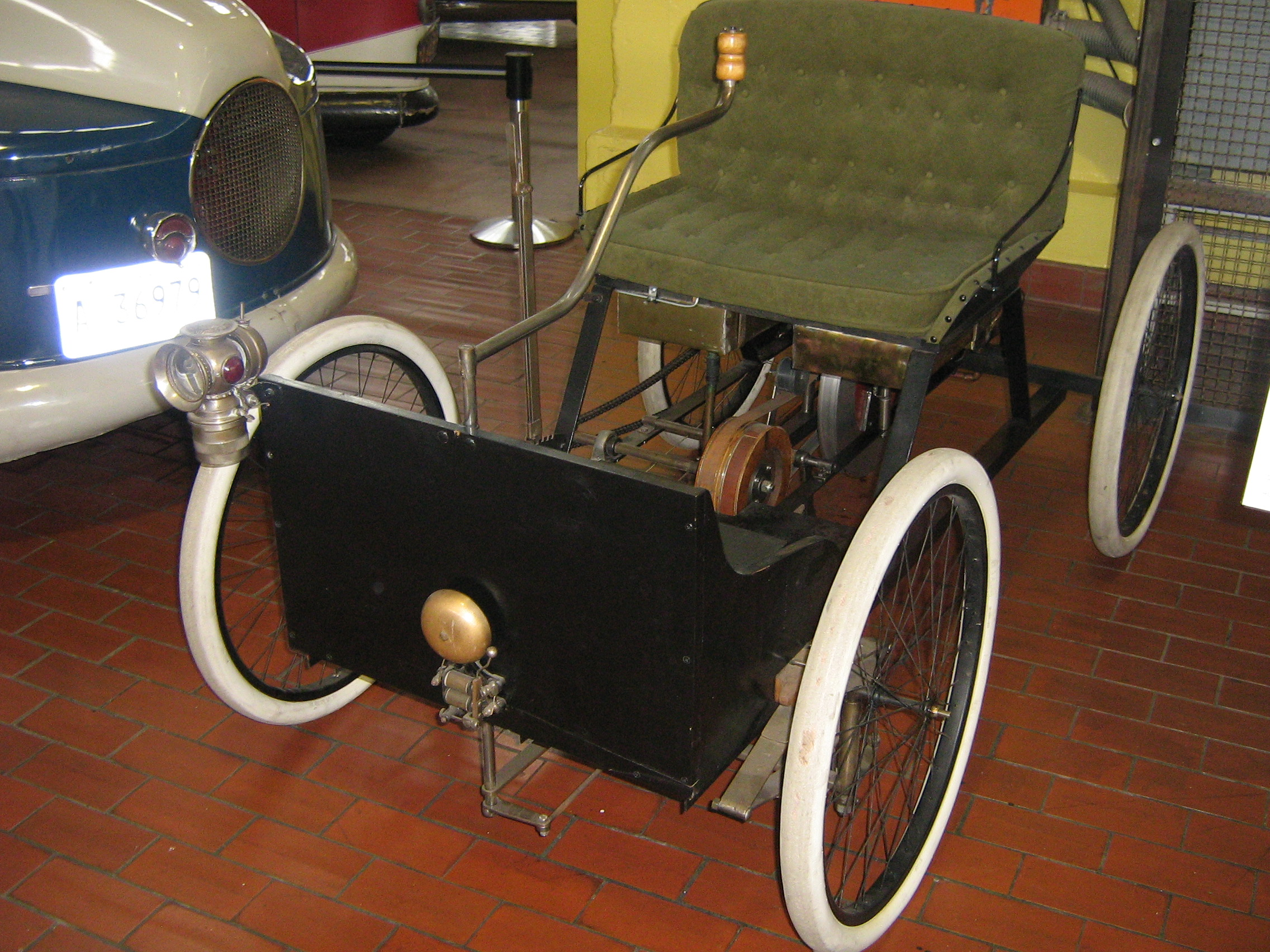 1896 Ford Quadricycle replica